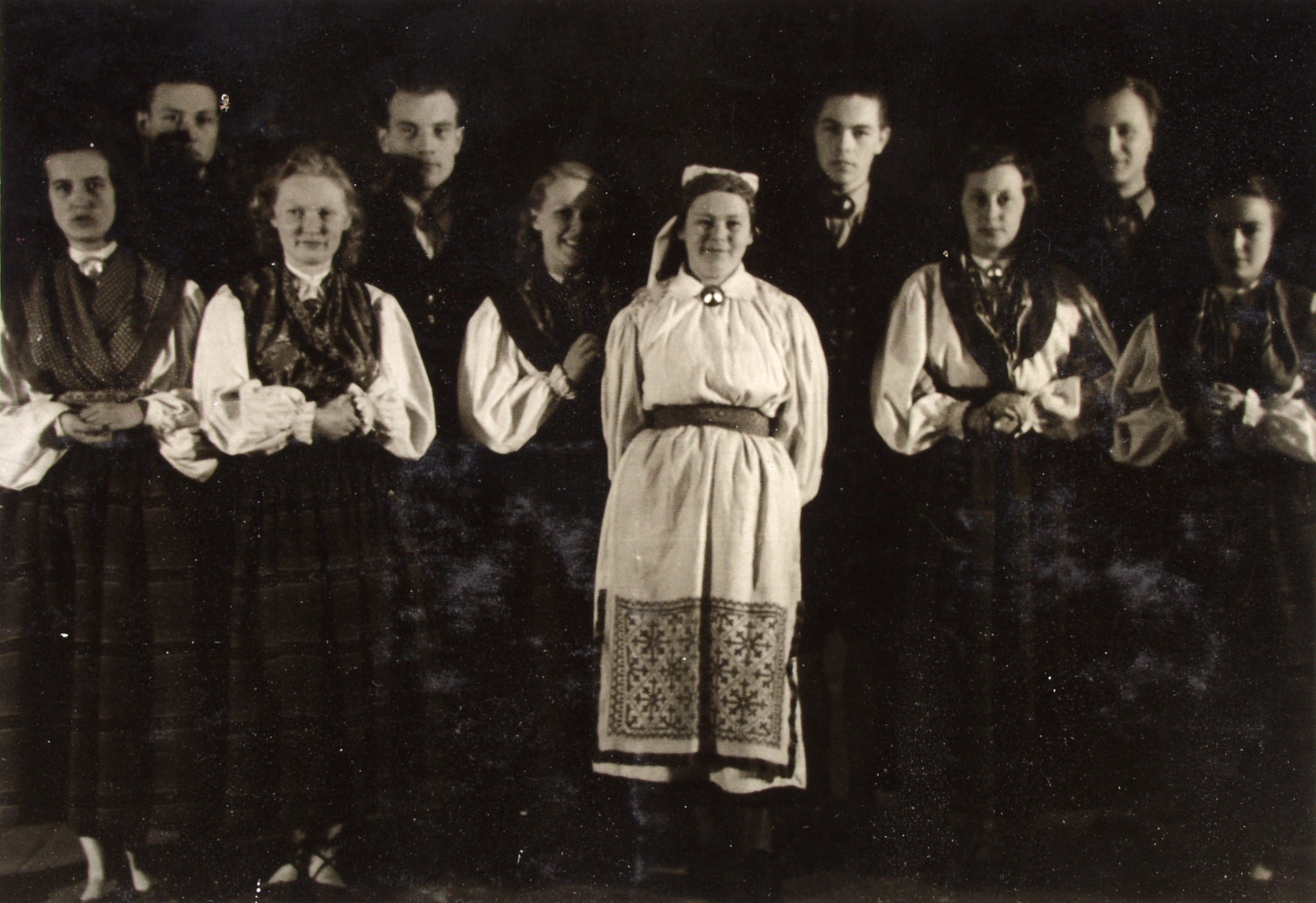 TRÜ RKA tantsijad 1950ndatel. Keskel Helju Mikkel.